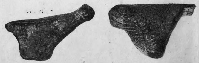 Фігурки вирізані з мамутячої кости з мізинської нахідки (пташки?).